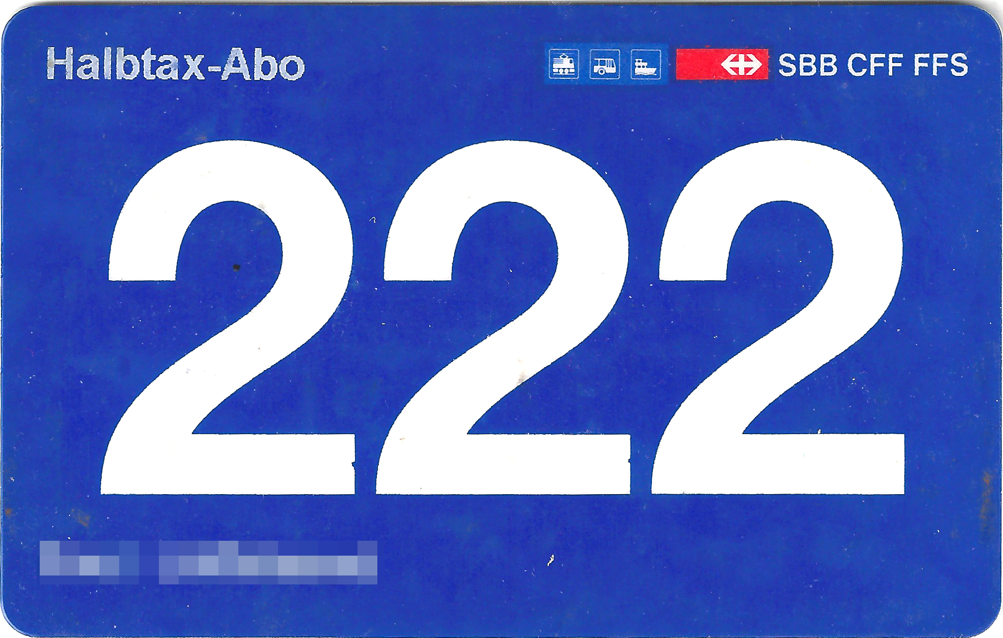 Halbtax-Abo SBB 1997-Vorderseite